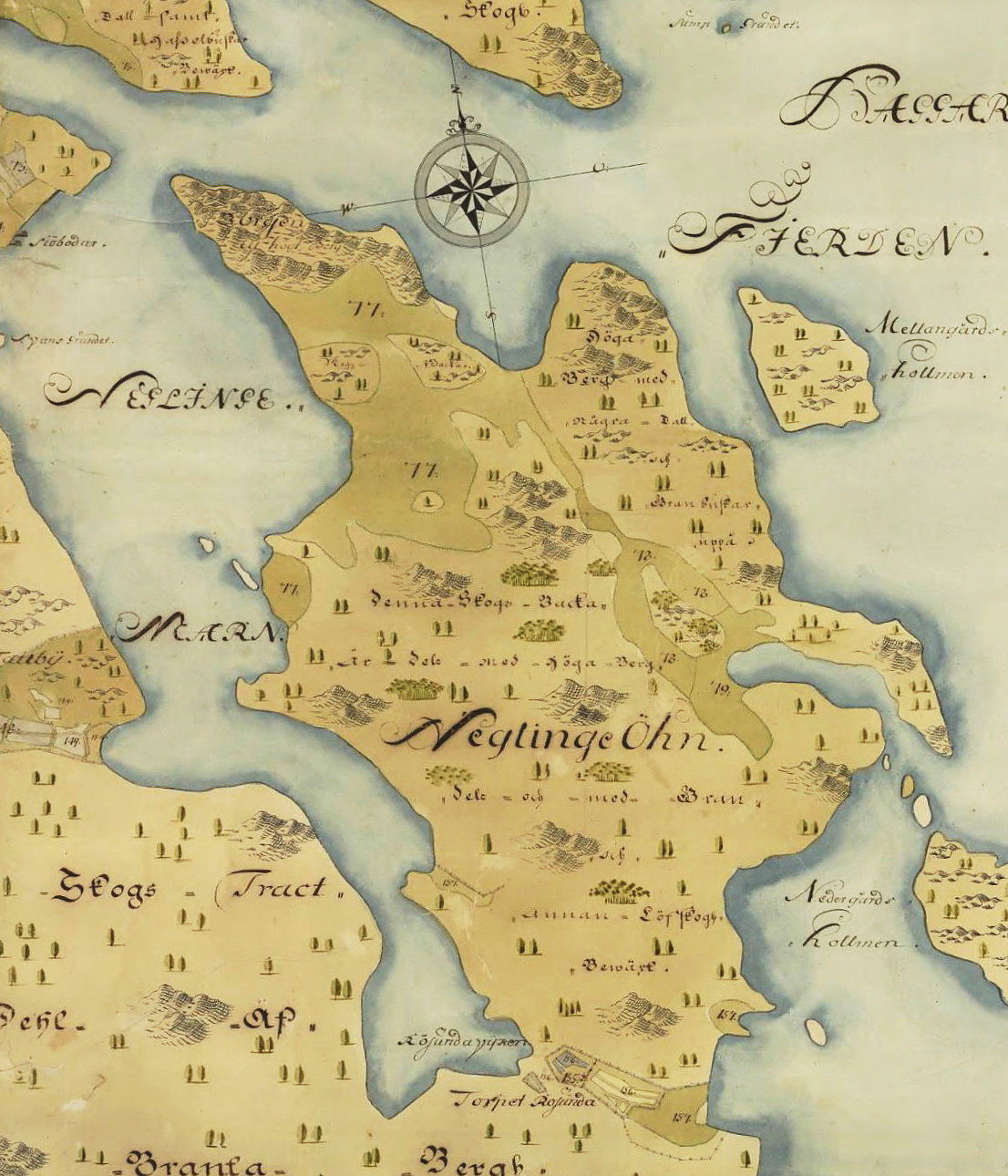 Del av Erstaviks ägor visande Neglingeön och Neglingeviken, uppmätta och nedtecknade år 1721, 1722 och 1723